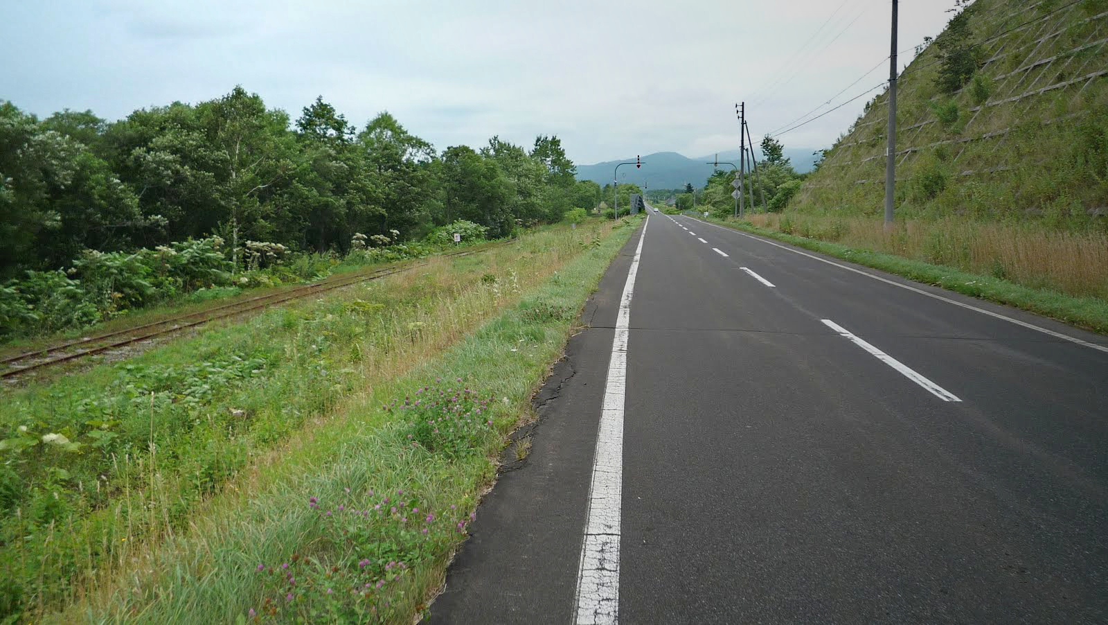 道道49号線と美幸線跡